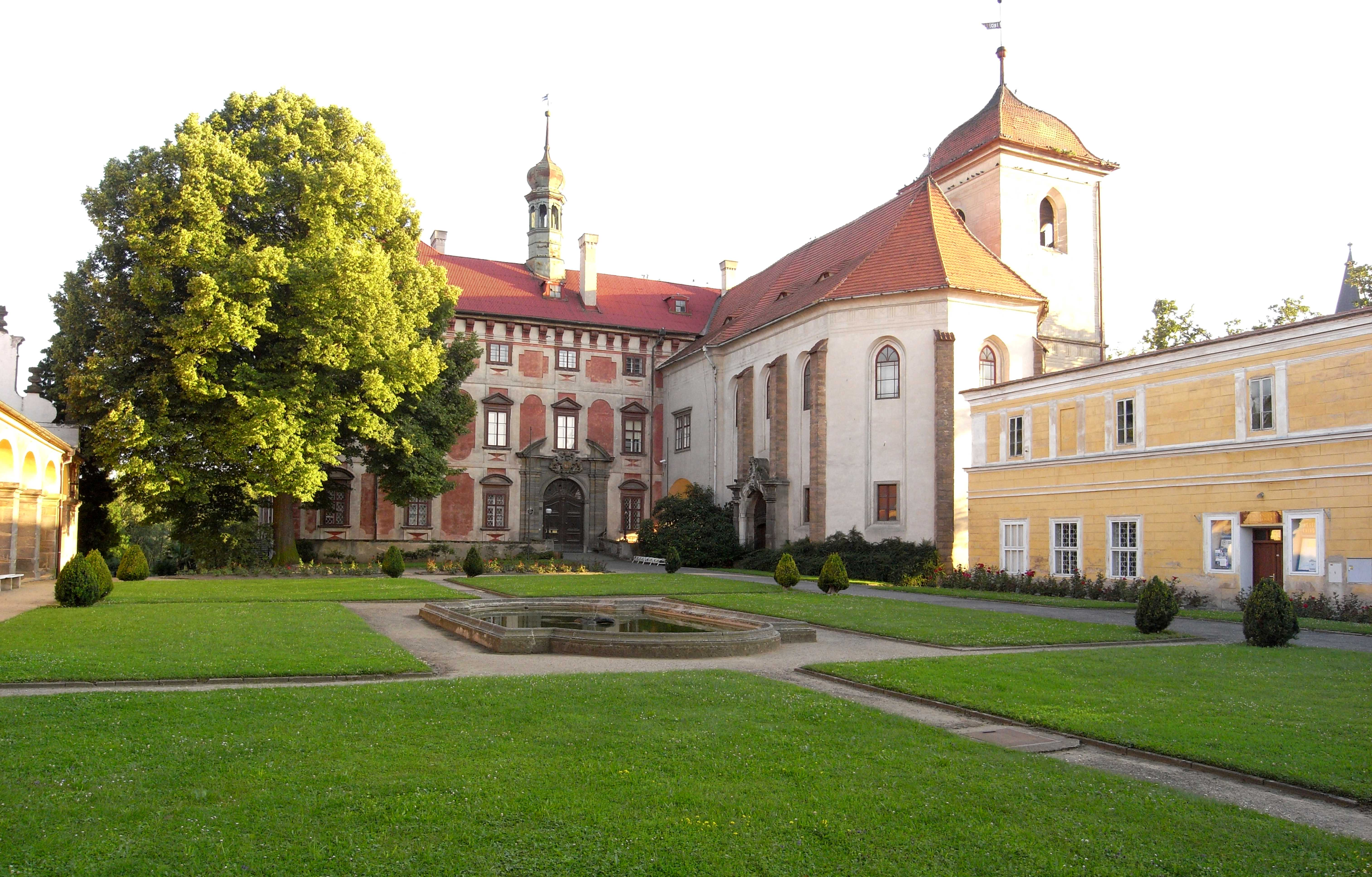 Schloss Lobochovice, Haupteingang und Schlosskapelle (Nordböhmen, Tschechische Republik)